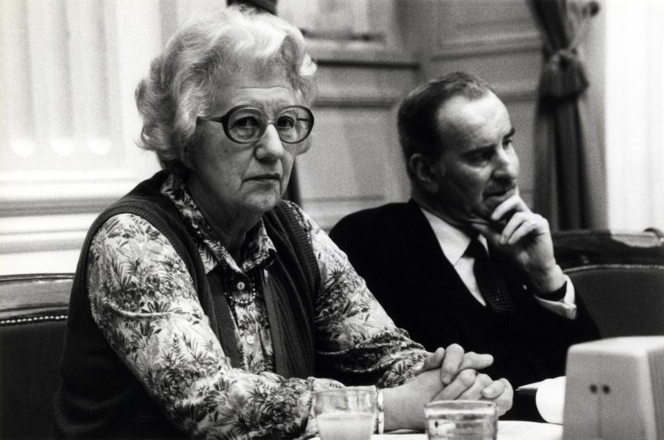 Haars, E.A. (CHU). Staatssecretaris Haars van Justitie met rechts naast zich minister v.d. Klaauw (buitenlandse zaken), tijdens een vergadering in de Tweede Kamer over de nota Surinamebeleid. Nederland, Den Haag, 27 januari 1981.